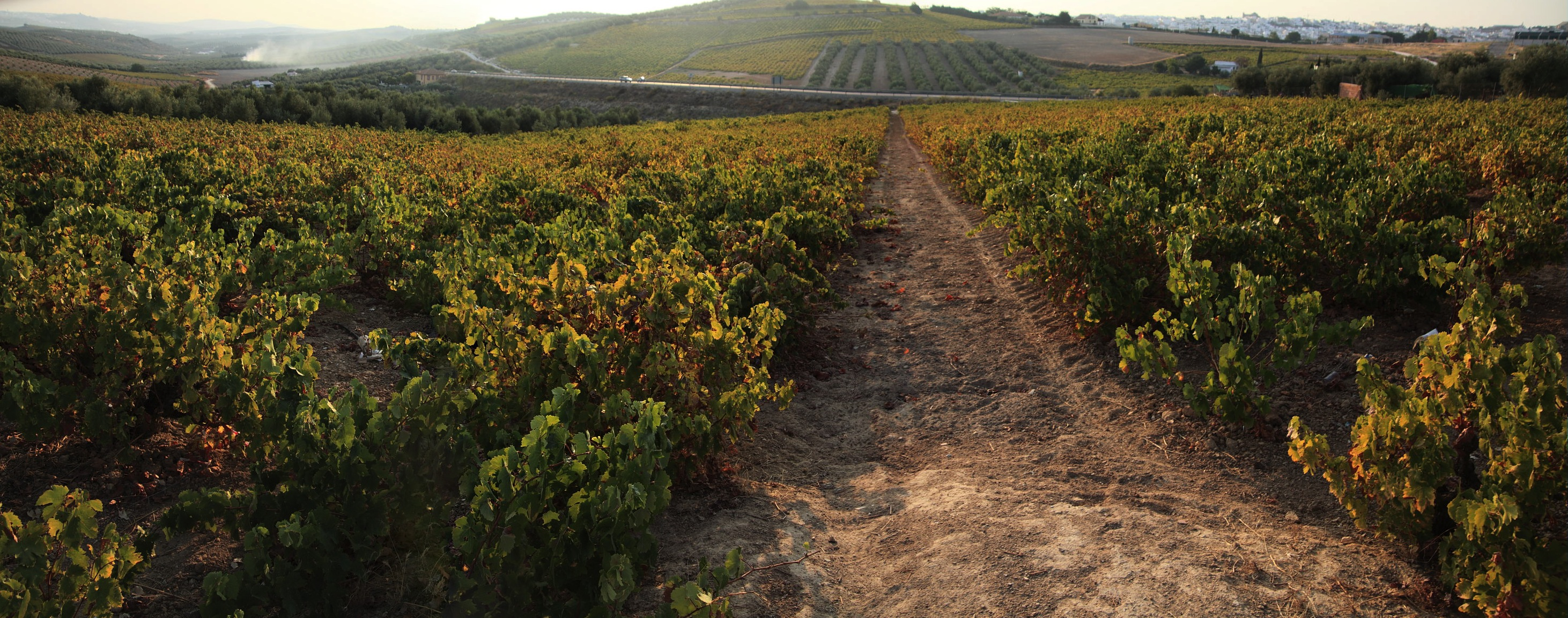 Vinyard in Montilla